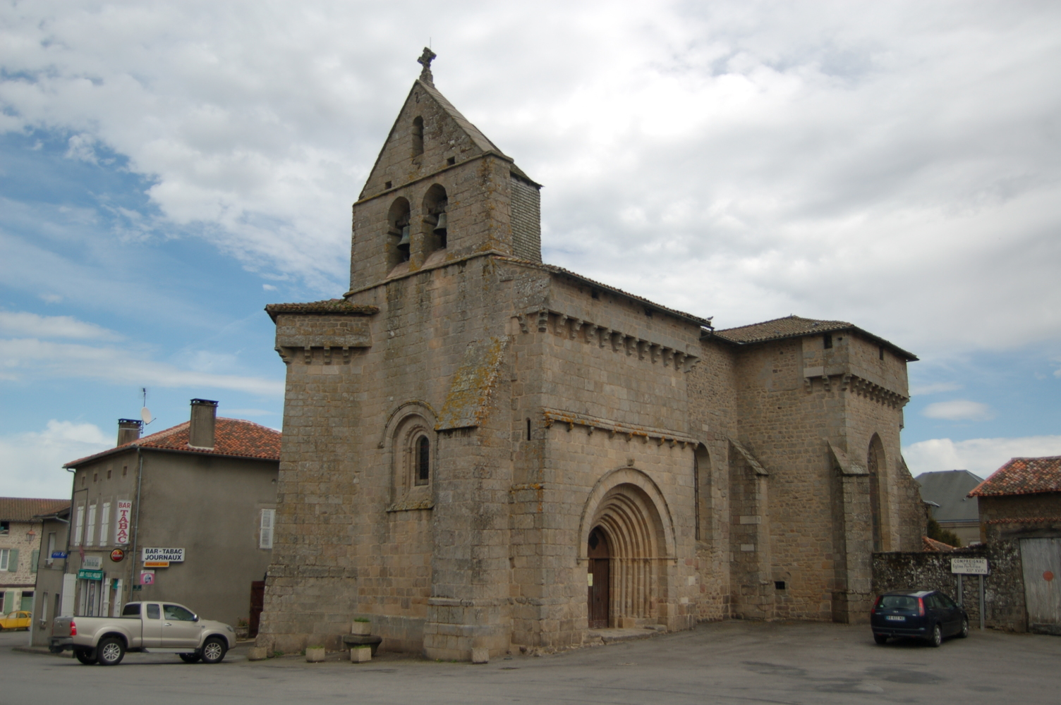 Église Saint-Martin de Compreignac